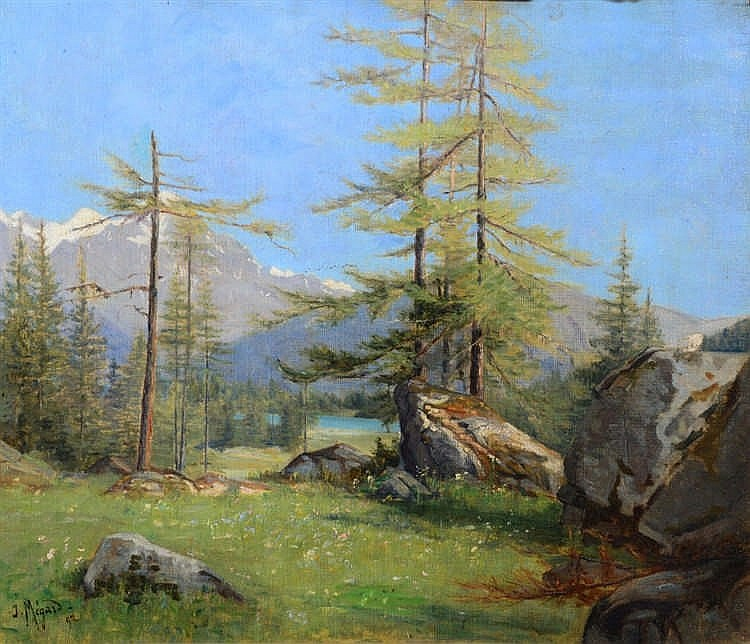 Un paysage alpin